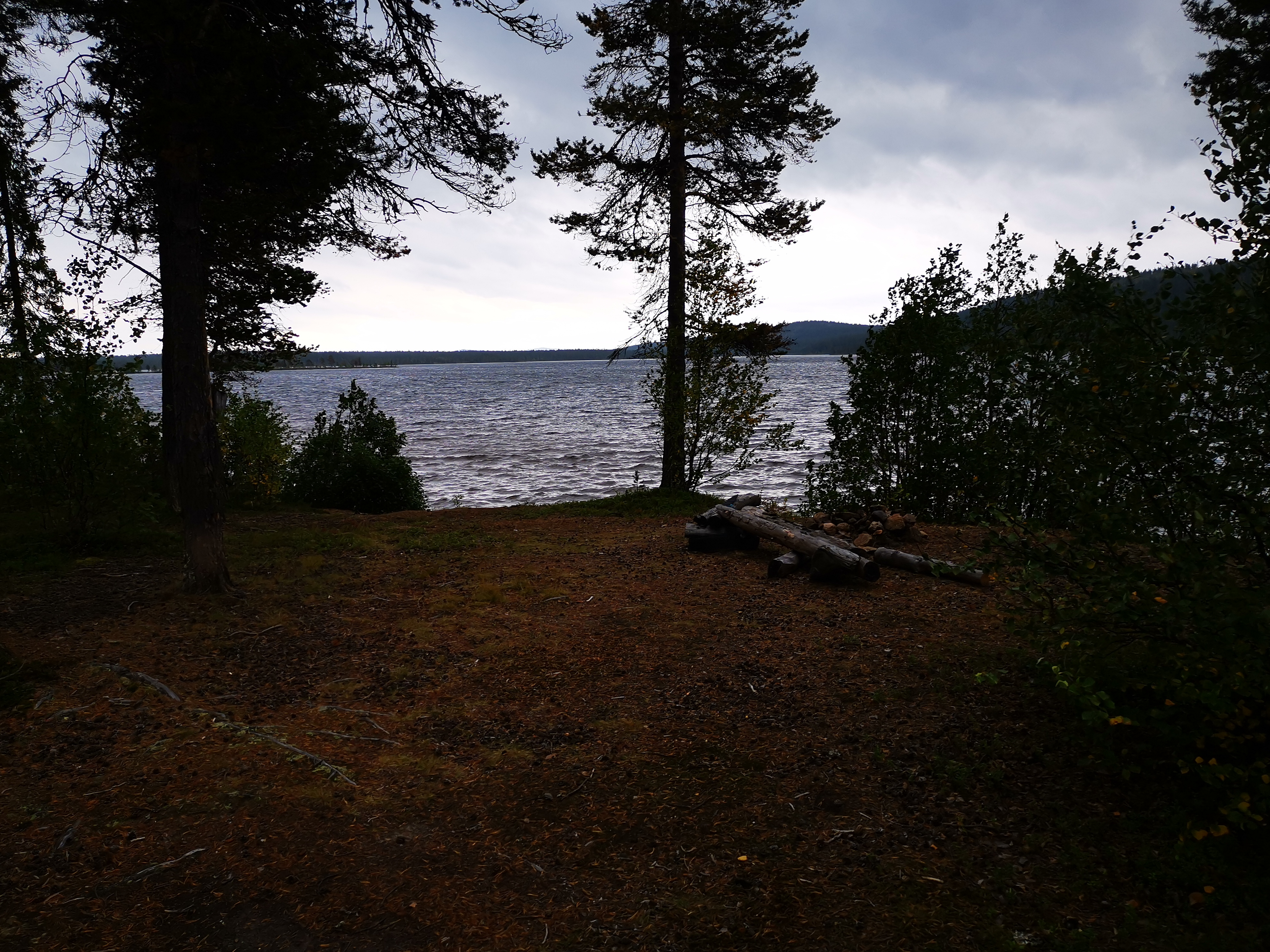 Mordplatsen September 2019, 35 år efter brottet